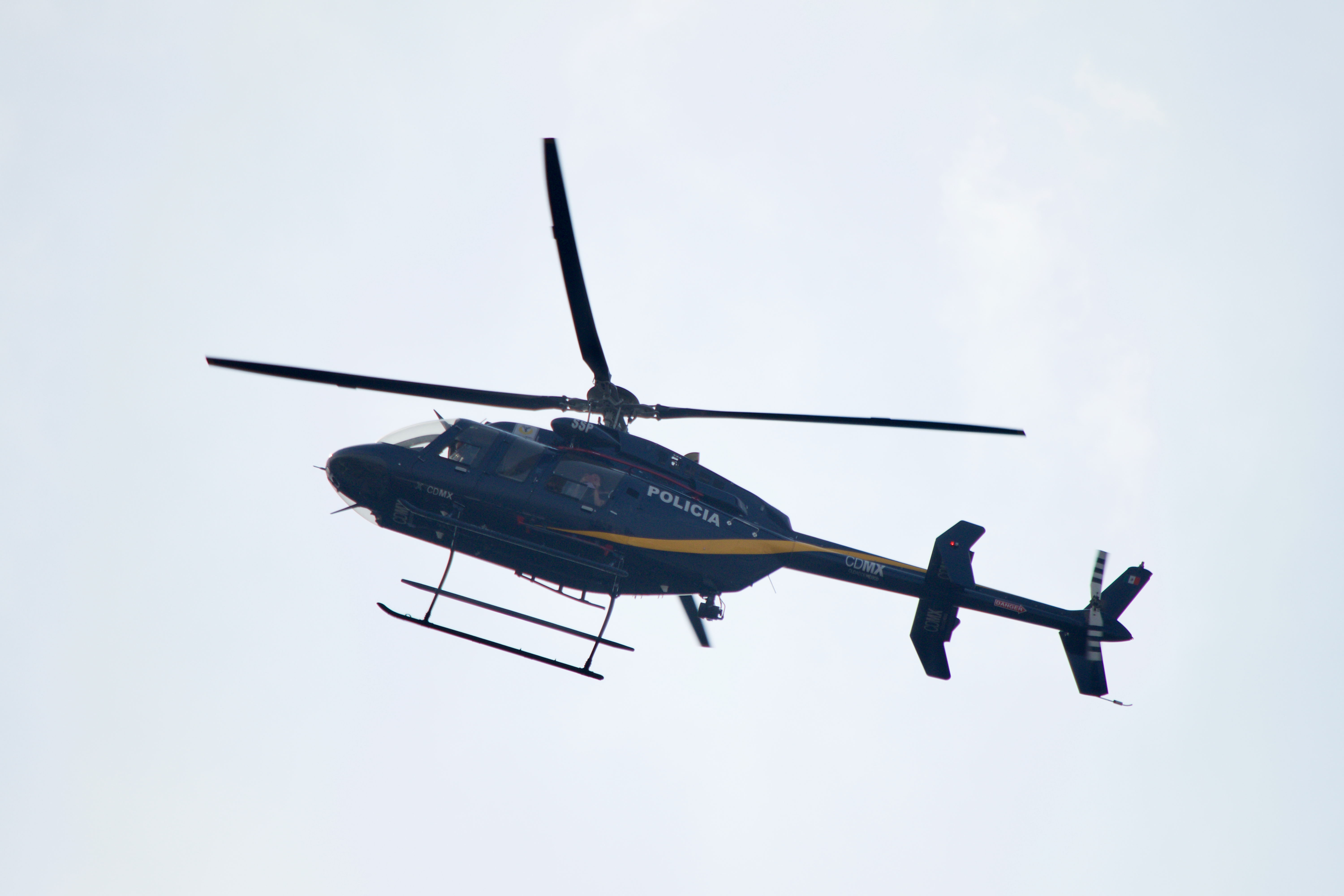 Helicóptero de la SSP